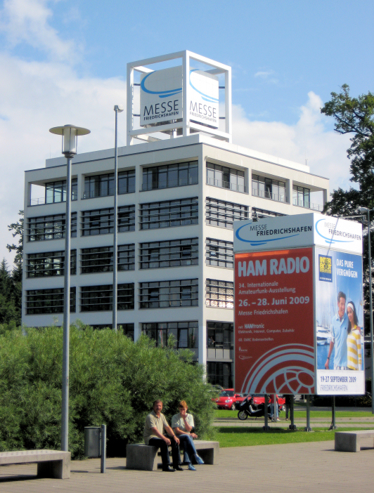 HAMRADIO 2009 - Messe Friedrichshafen